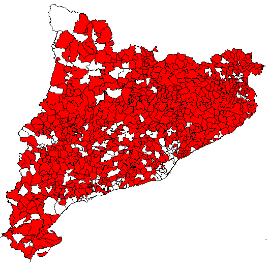 Mapa municipal del Principat de Catalunya on figuren en vermell els municipis adherits a l'AMI.